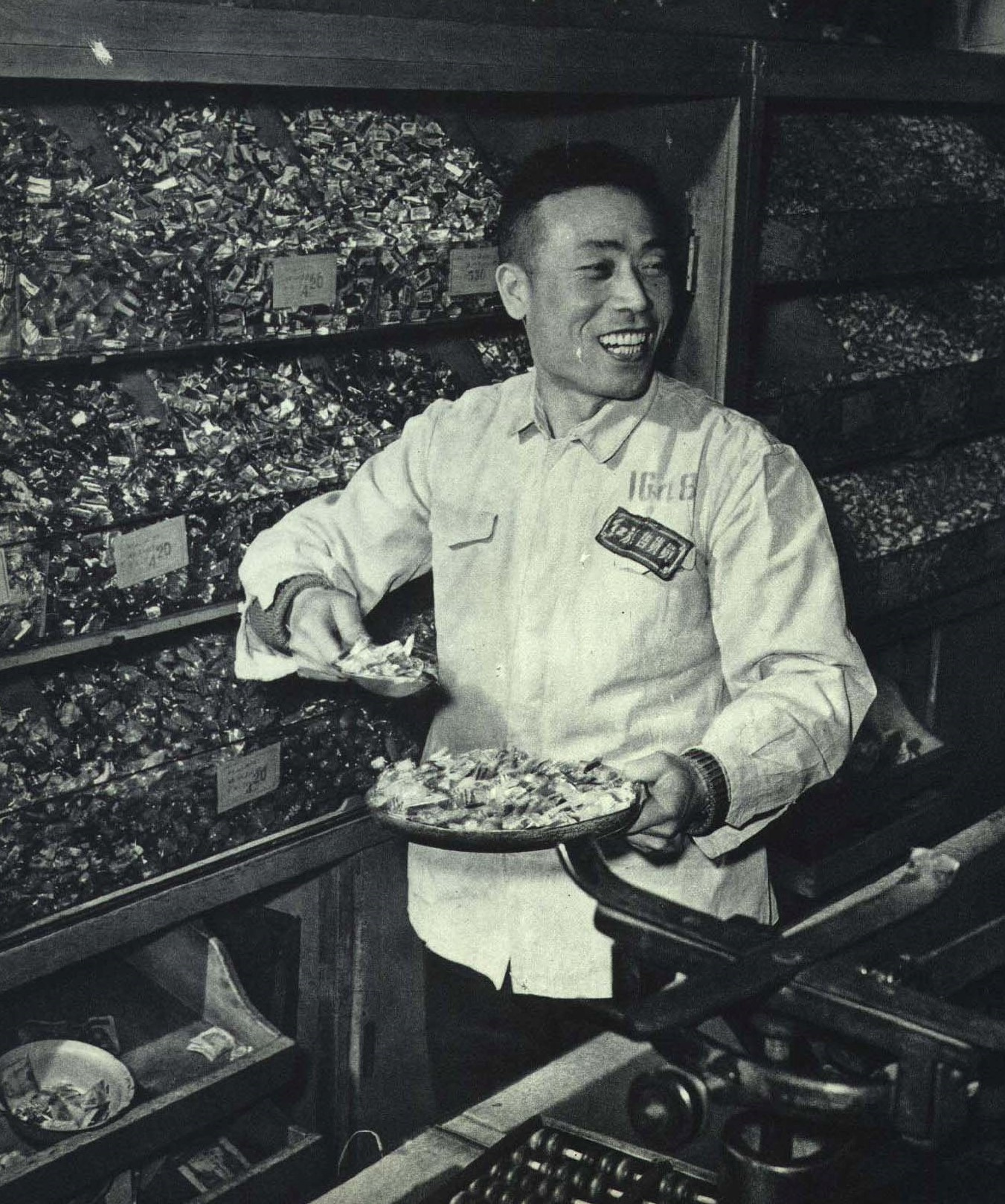 1963-06 1963年 北京 张秉贵